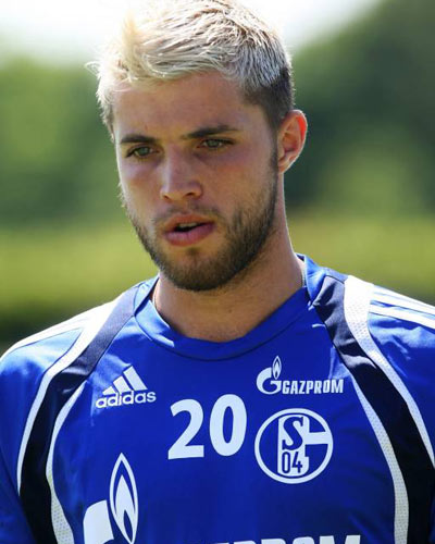 Футболист. Греческий полузащитник.